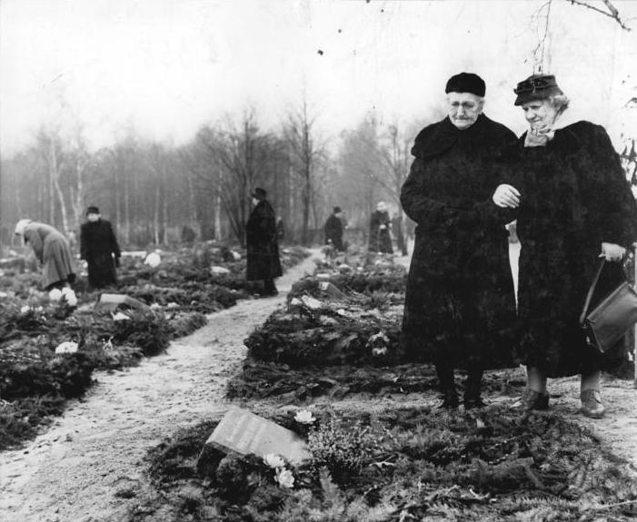 Zentralbild-Brüggmann We-Qu 26.11.1961 Totensonntag. Auf dem Friedhof in Berlin-Baumschulenweg.